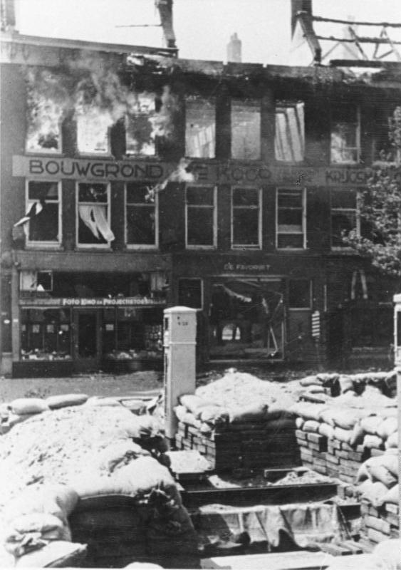 Holland. Nach dem Kampf um Rotterdam. Holländische Straßenbefestigungen.